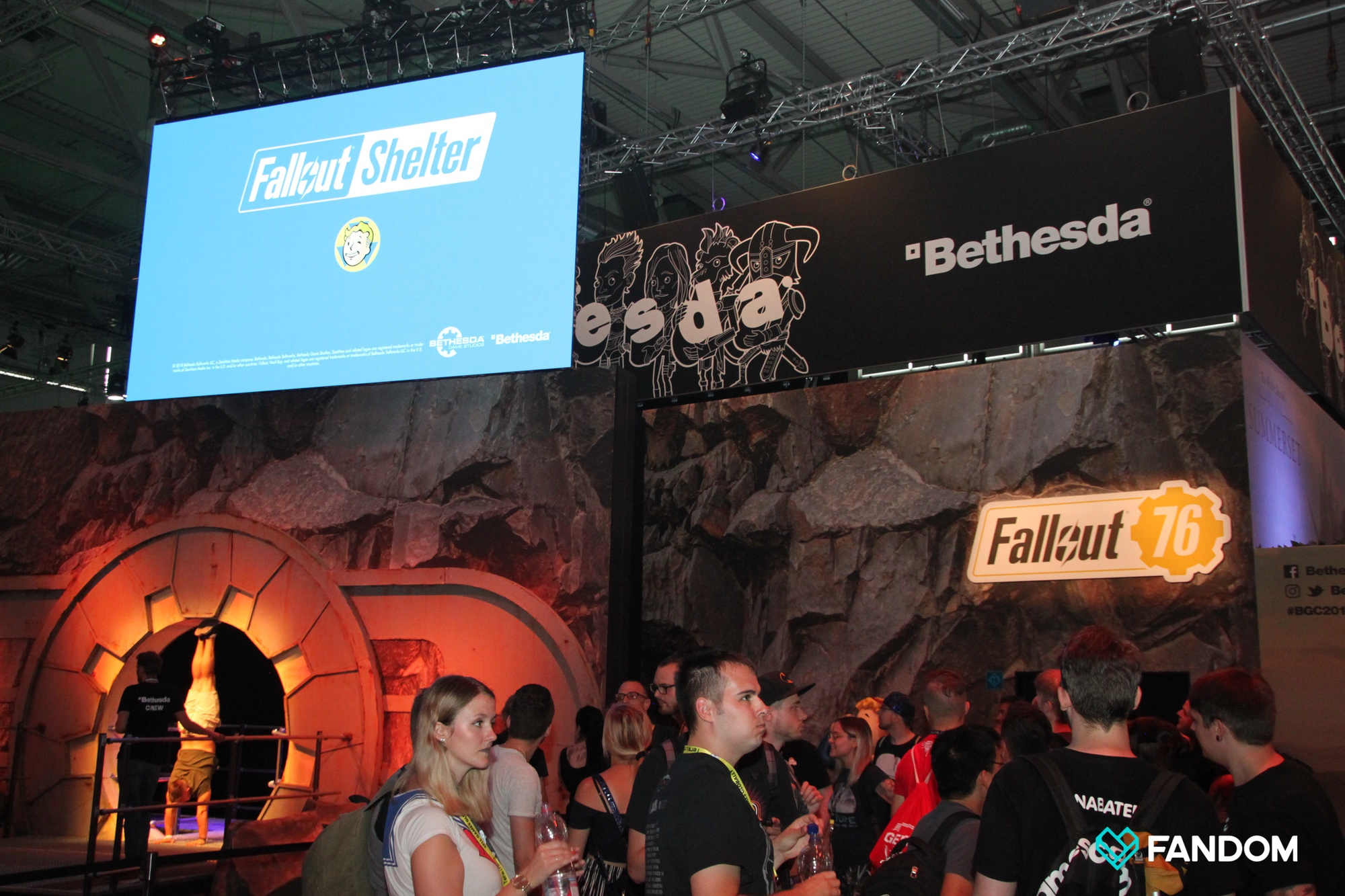 FANDOM für euch auf der gamescom unterwegs... Sonstige Neuigkeiten